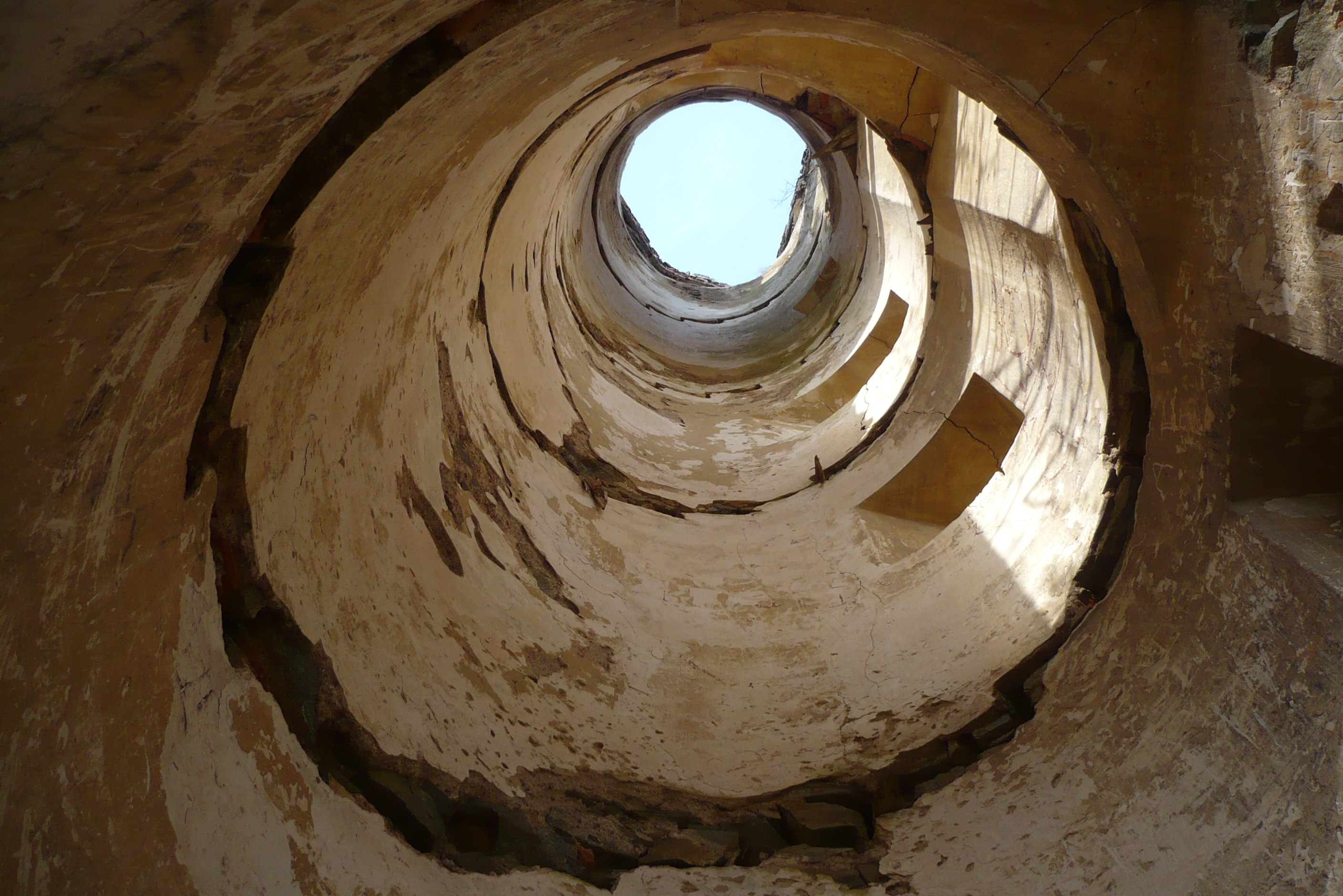 Wieża na Grodziszczu